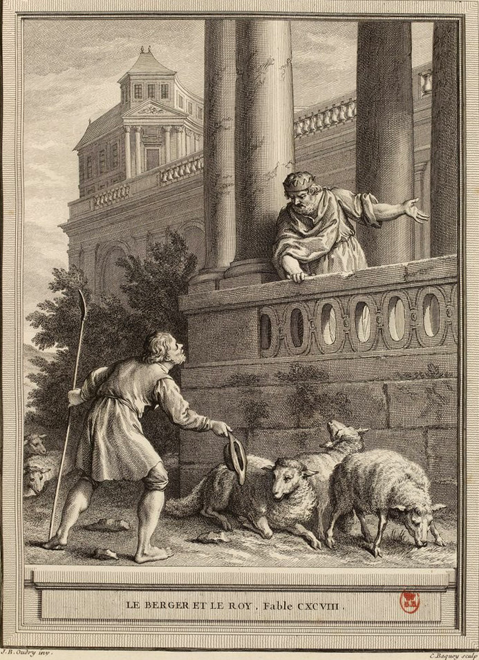 Gravure réalisée par Charles Baquoy d'après un dessin de Jean-Baptiste Oudry représentant la fable Le berger et le roi de Jean de La Fontaine (fable 9 du livre X). Cette gravure est parue dans l'édition complète des fables de La Fontaine, parue en quatre tomes chez l'éditeur Desaint & Saillant, rue saint Jean de Beauvais à Paris, 1755-1759.